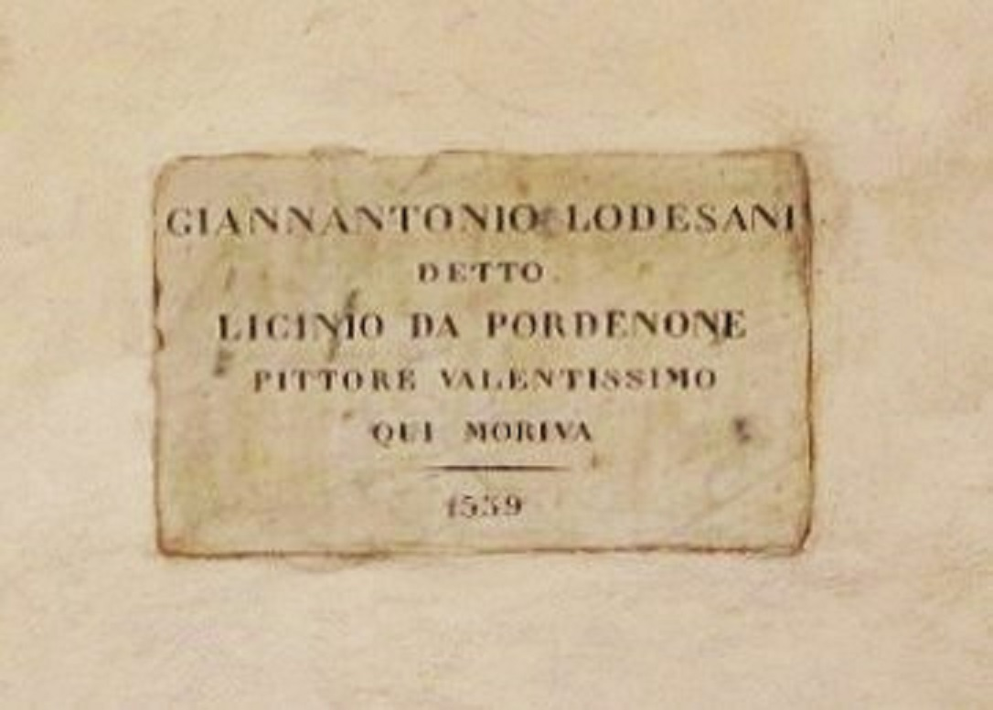 GIANNANTONIO LODESANI DETTO LICINIO DA PORDENONE PITTORE VALENTISSIMO QUI MORIVA 1539